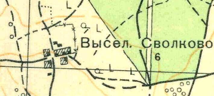 Топографическая карта Ленинградской области, квадрат О-35-24-Б-в (Вохоново), деревня Волгово